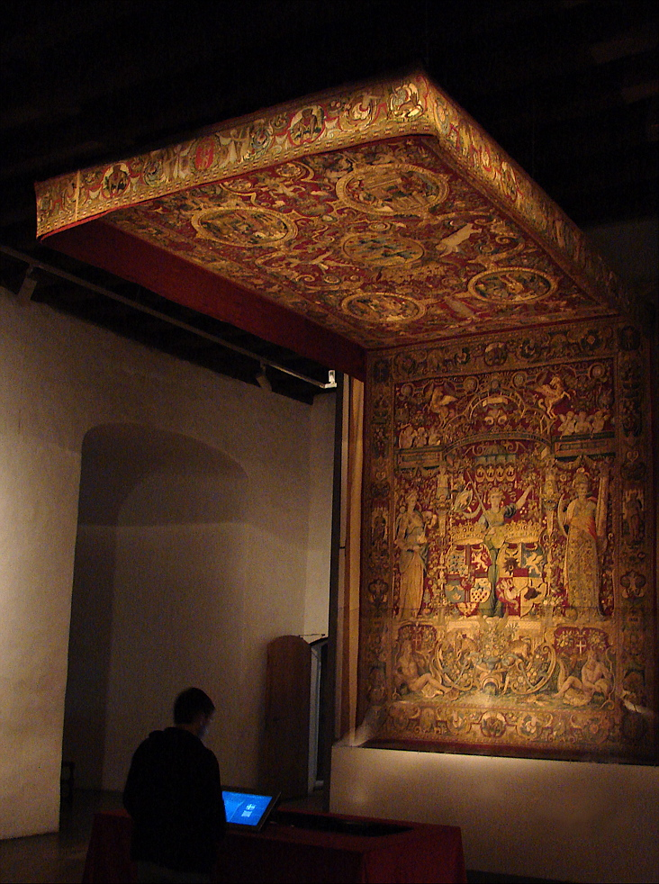 Frederik II af Danmark og Norges bordhimmel på Kronborg Slot. Udlånt fra Stockholm Museum.